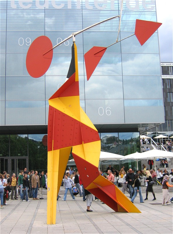 Alexander Calder: Crinkly avec disc rouge, 1973 Schlossplatz in Stuttgart (Öffentlicher Platz)